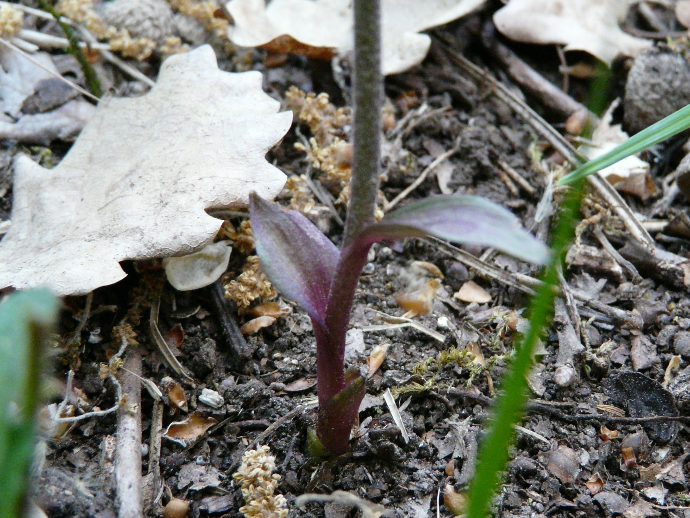 Feuilles d'épipactis à petites feuilles (Epipactis microphylla), Trélissac, Dordogne, France.